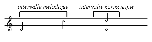 Description : Intervalle de neuvième Source : Personnelle Licence : GFDL